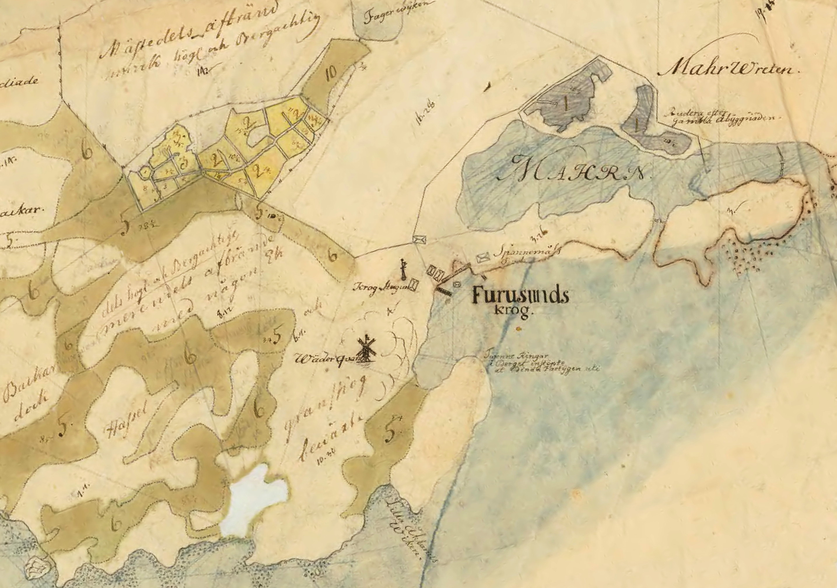 Karta öfver egorna till Eknö uti Stockholms län, Frötuna Skeppslag, Länna socken, författad dels år 1751 dels 1752 af Magn. Kjellström jemte tillhörande beskrifning”.